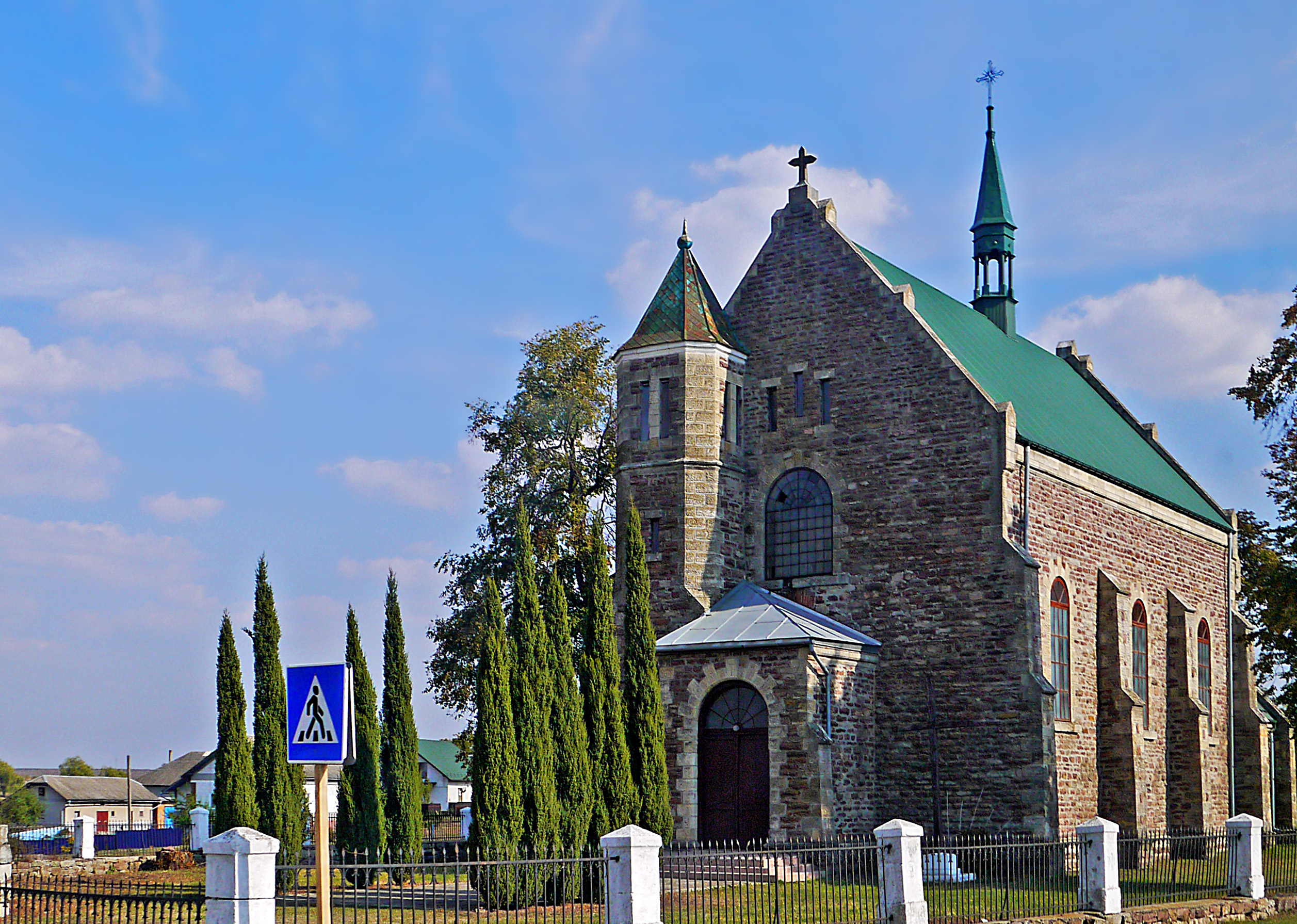 Костел Неустанної Помочі Божої Матері (мур.), село Трибухівці